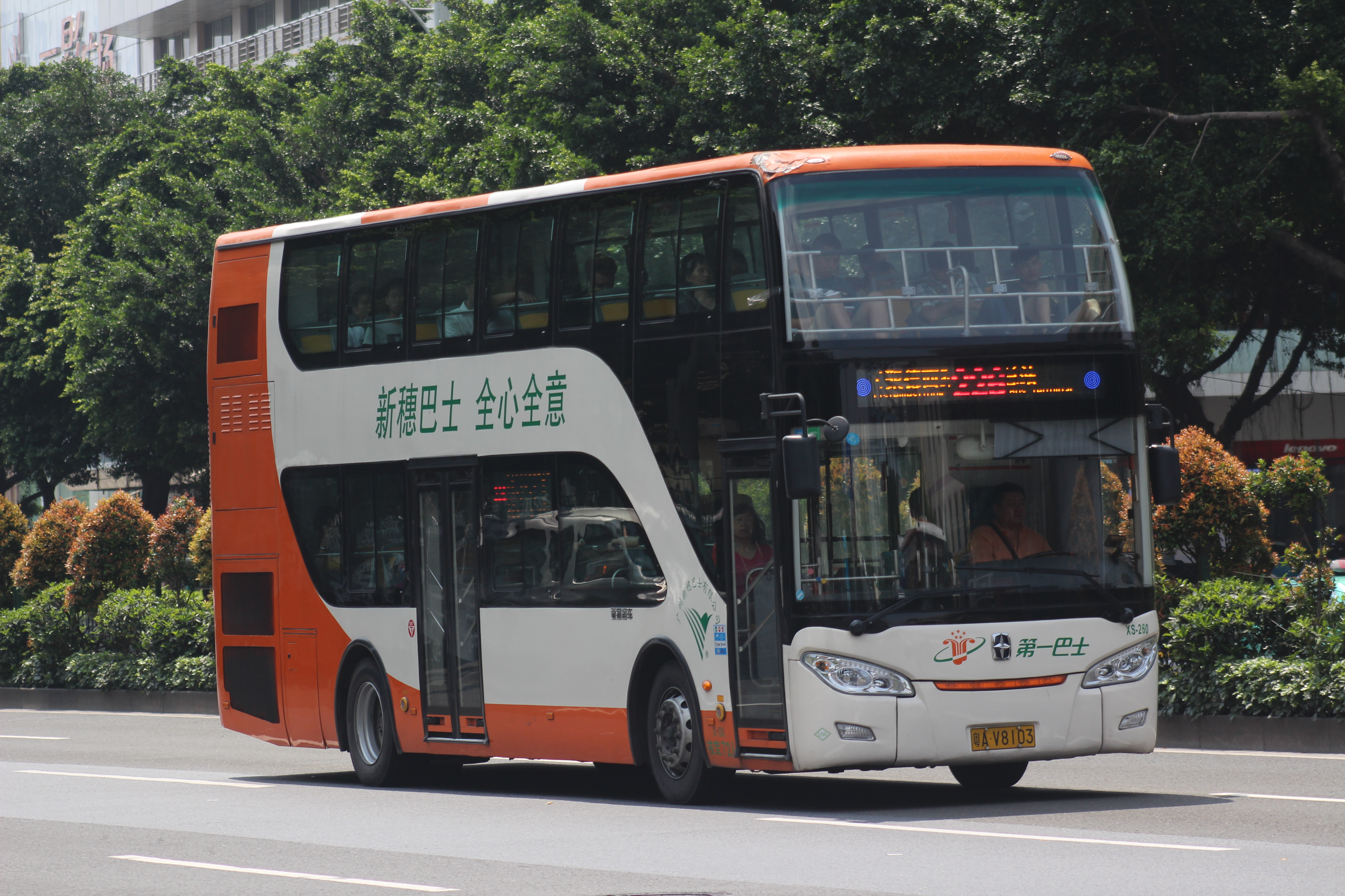 广州新穗巴士的标高版JS6111SHCP正行驶于226路